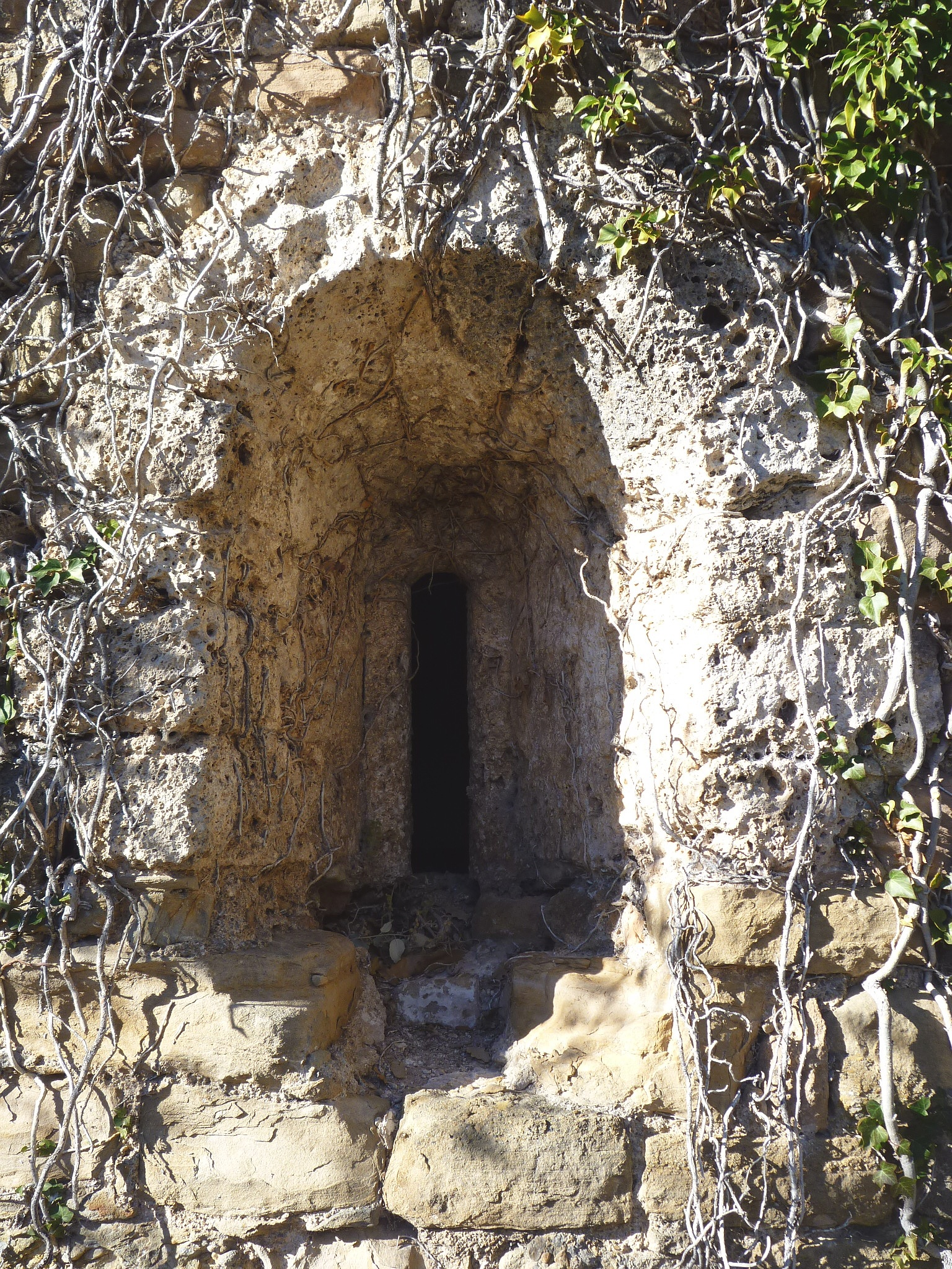 Santa Eugènia de la Móra Comdal (Odèn): finestra a l'absis